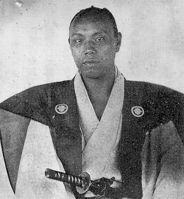 江戸時代末期の旗本・木村芥舟（喜毅・摂津守、1830 - 1901）の肖像写真。